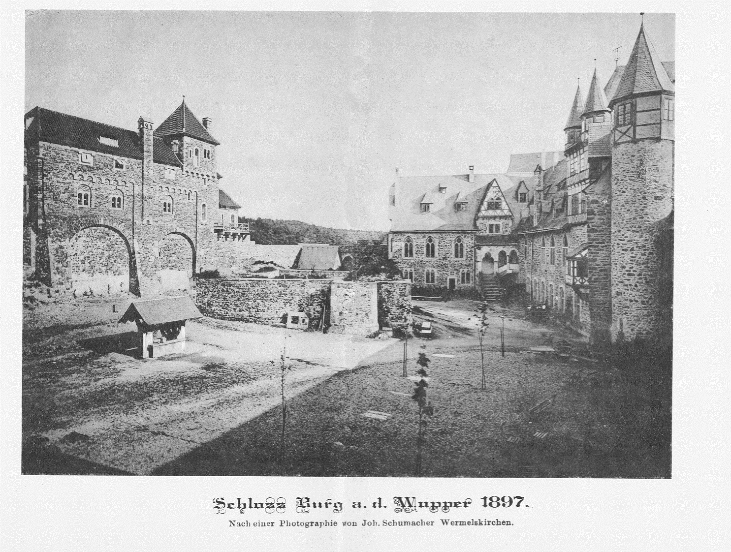 Schloß Burg 1897 vor dem Bau des Bergfrieds